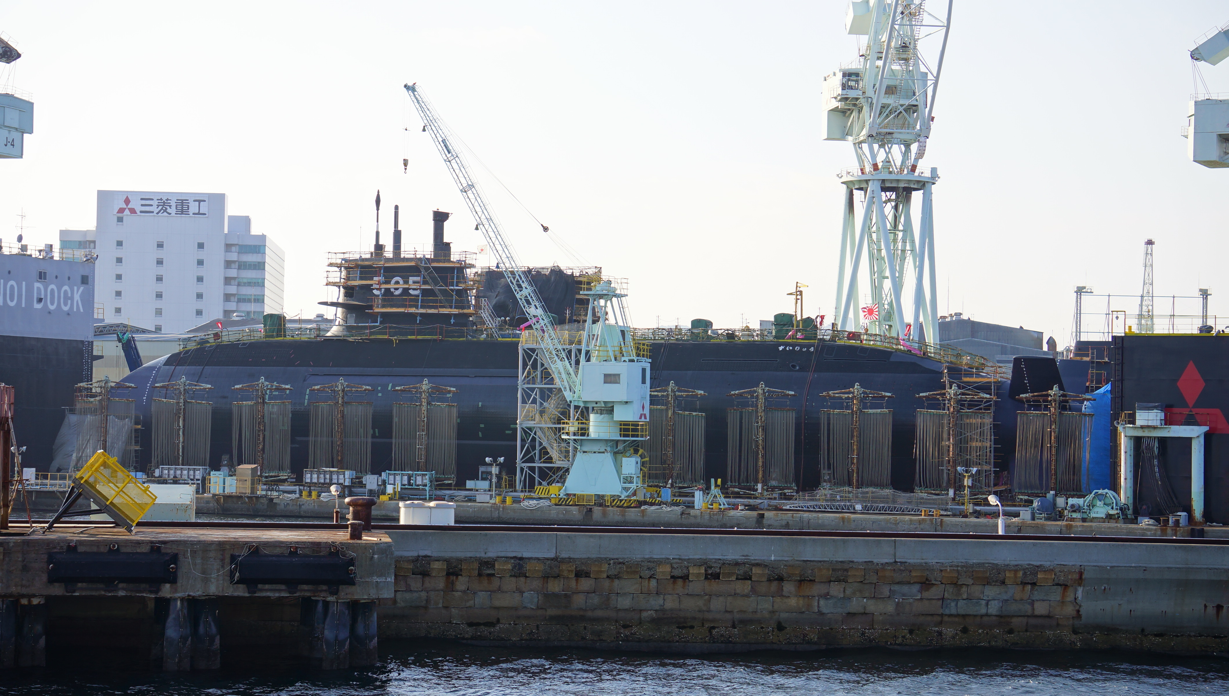 海上自衛隊 潜水艦ずいりゅう（SS-505） 12年12月16日 三菱重工神戸造船所にて艤装中